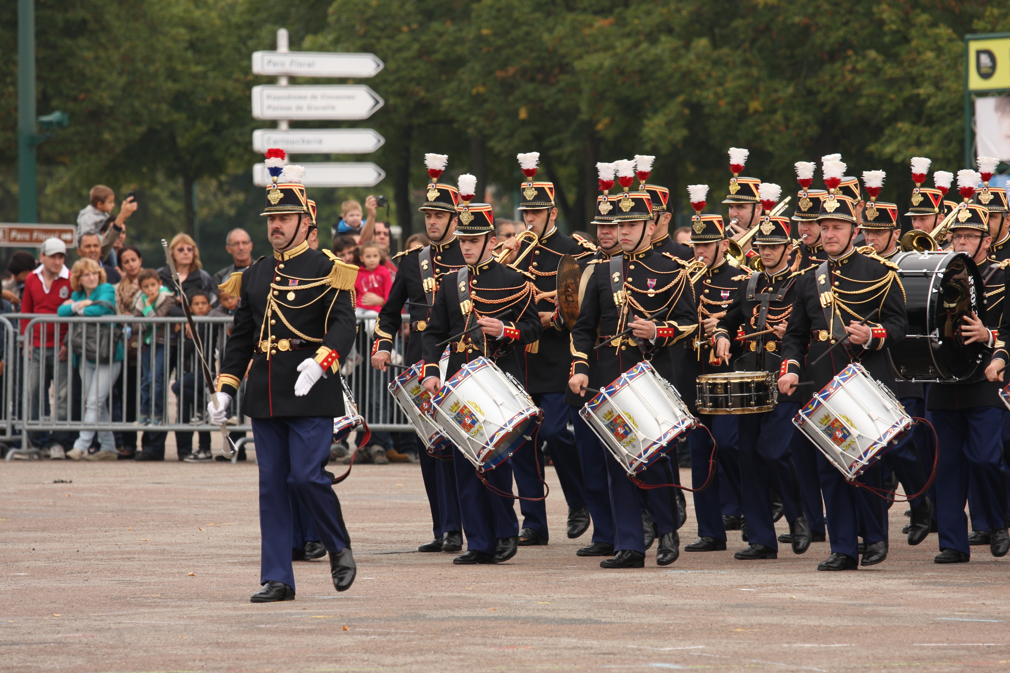 Musique de la Garde - Quartier Carnot - Septembre 2013